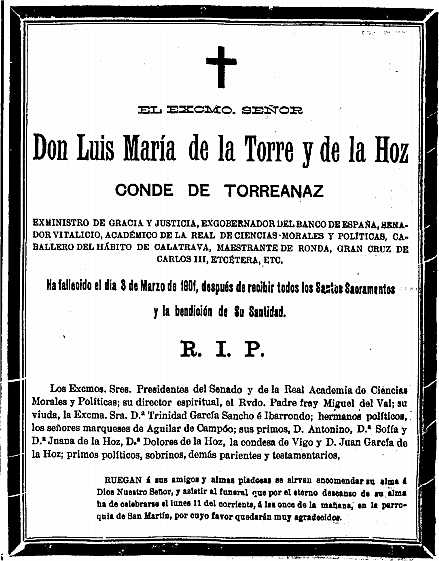 Luis Maria de la Torre ha fallecido el dia 3.3.1901